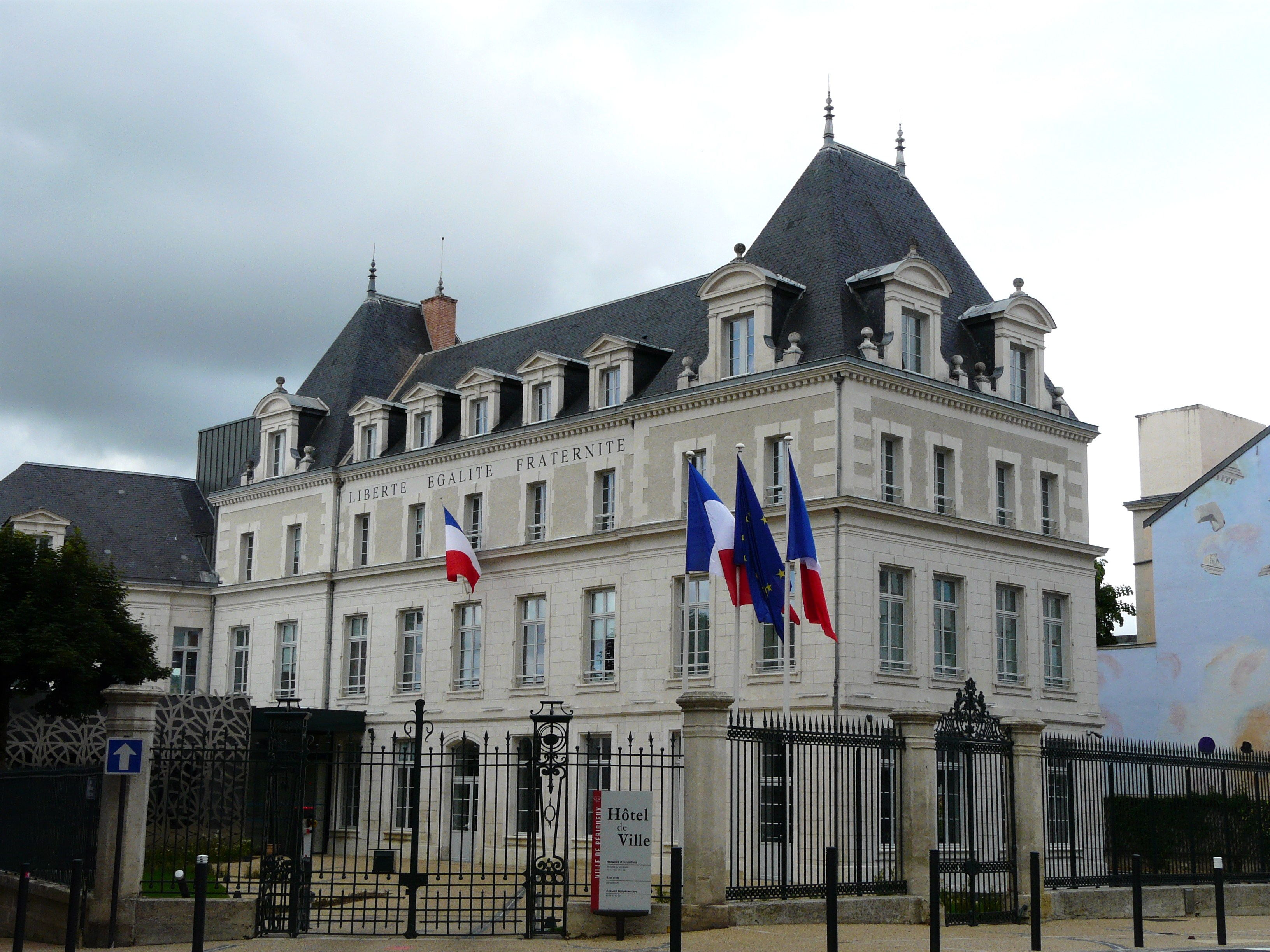 Le nouvel hôtel de ville de Périgueux, Dordogne, France.